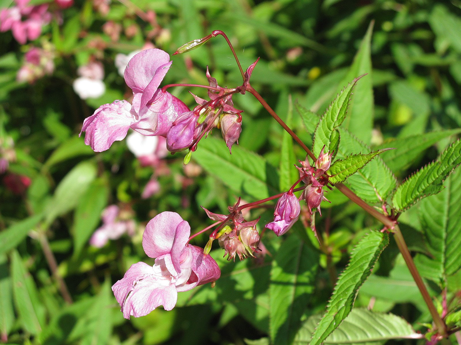 Бальзамин. Сфотографировано на юге Германии.